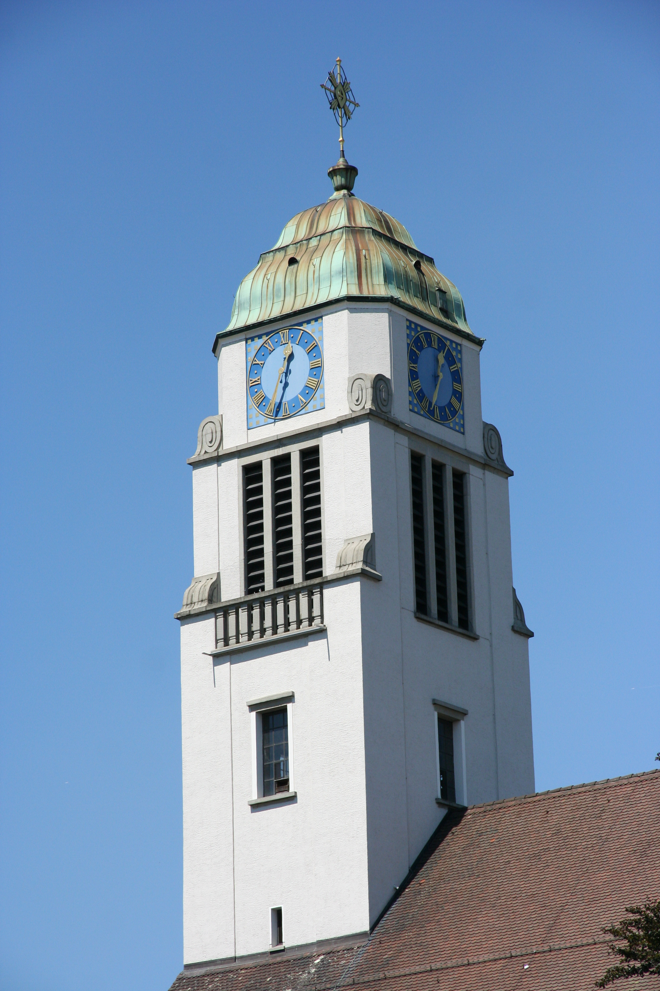 Römisch-katholische Pfarrkirche St. Agatha Dietikon, Turm von Süden